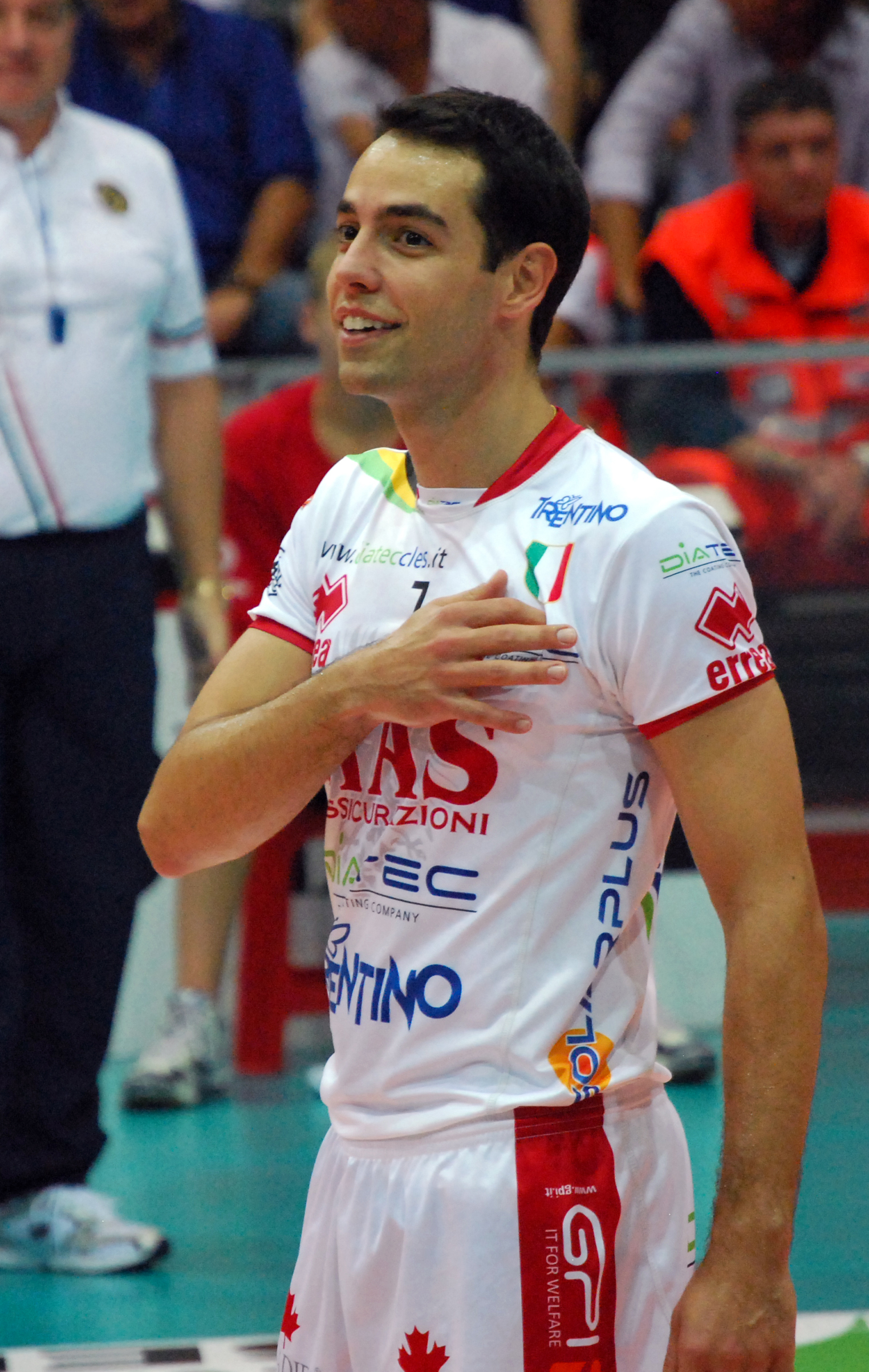 Foto che ho scattato al Palabanca di Piacenza in occasione della partita Copra-Trento